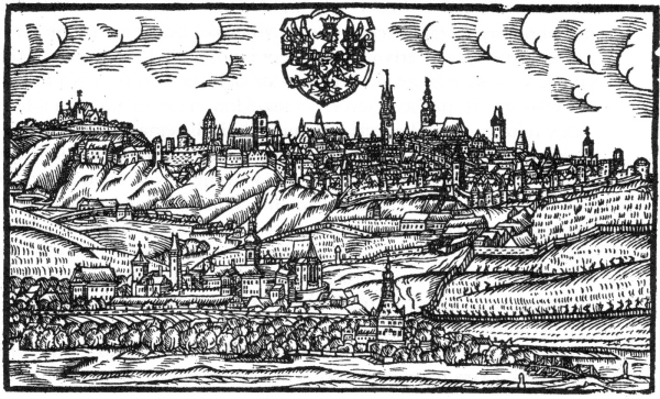 Znojmo konec 16. století